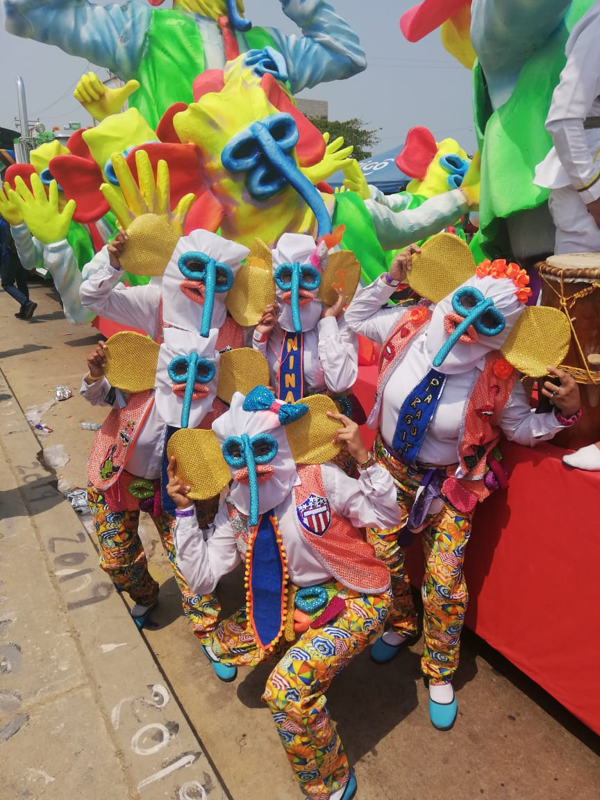 Marimondas del barrio abajo